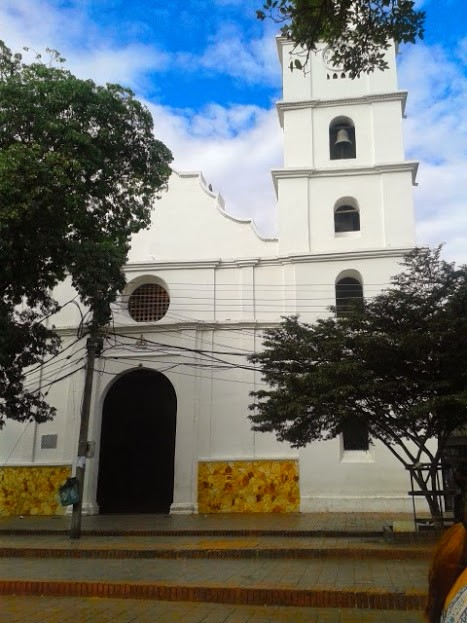 Iglesia Colonial, Neiva, Huila. Esta fotografía fue tomada en el municipio colombiano con código 41001.